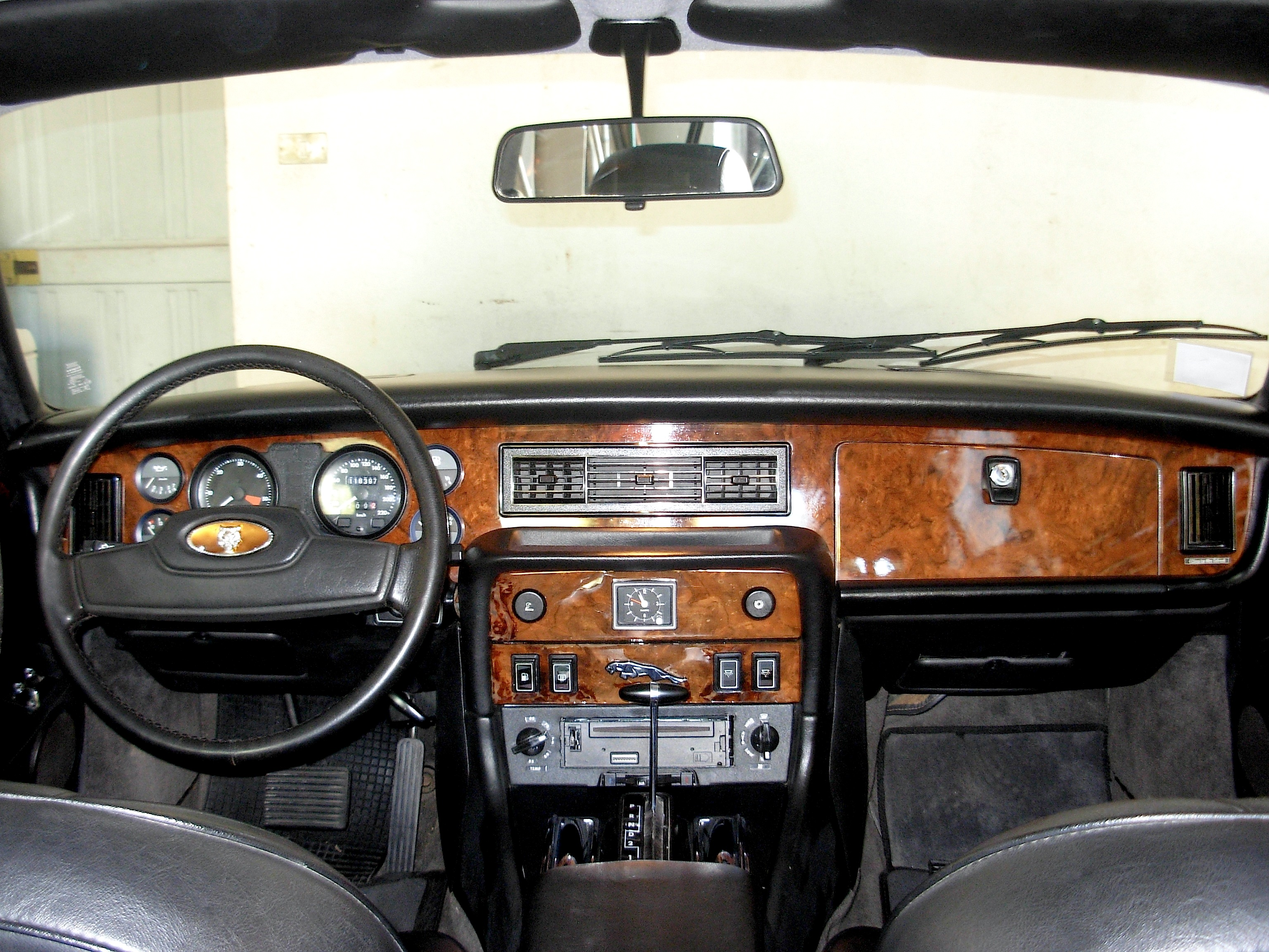 Un'immagine degli interni di una Jaguar Sovereign 4.2